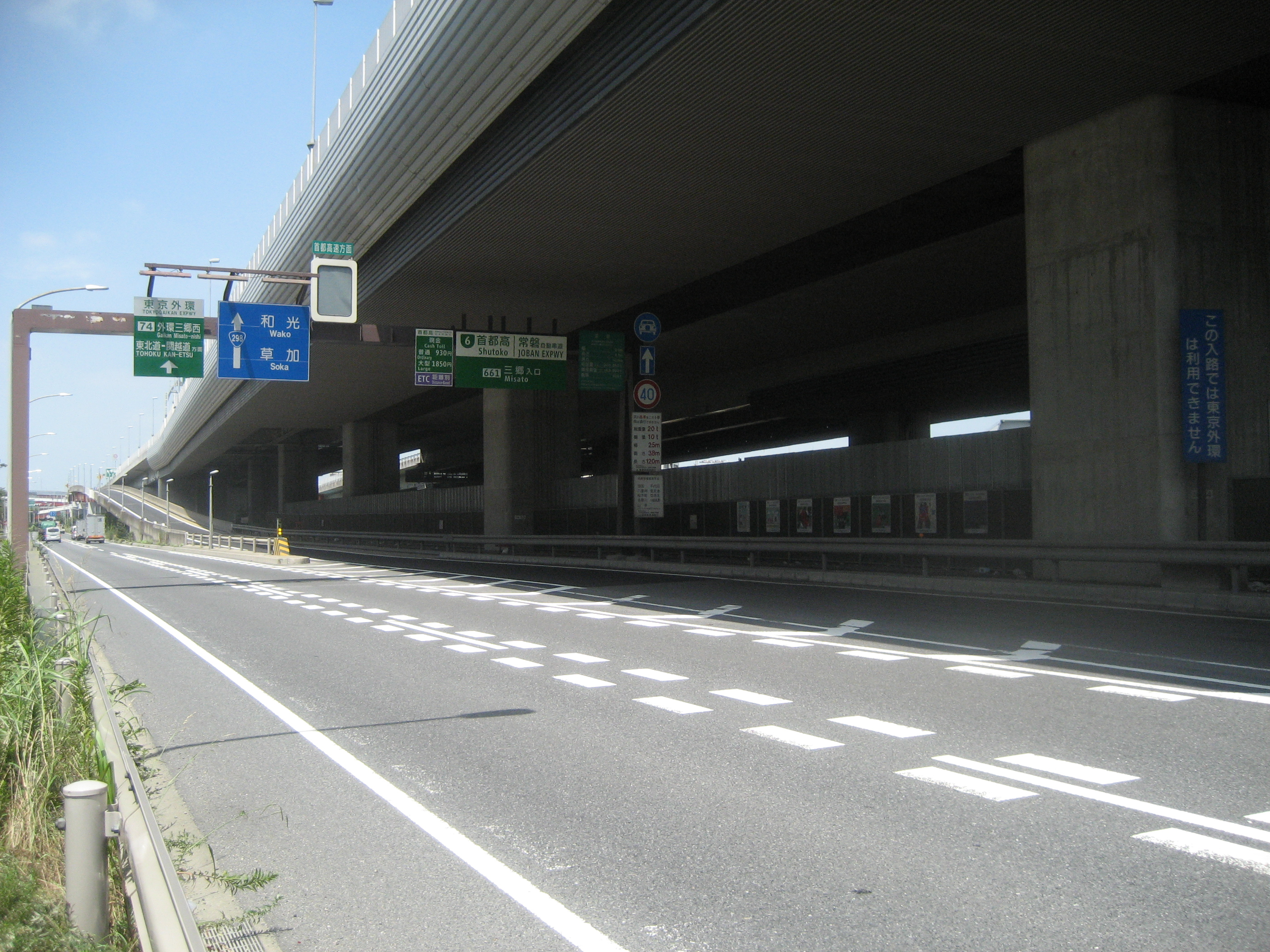 常磐自動車道・首都高速道路三郷入口（国道298号線草加方面側入口付近）